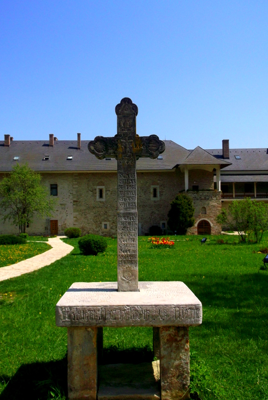 Suczawica (Sucevita), krzyż na dziedzińcu klasztornym